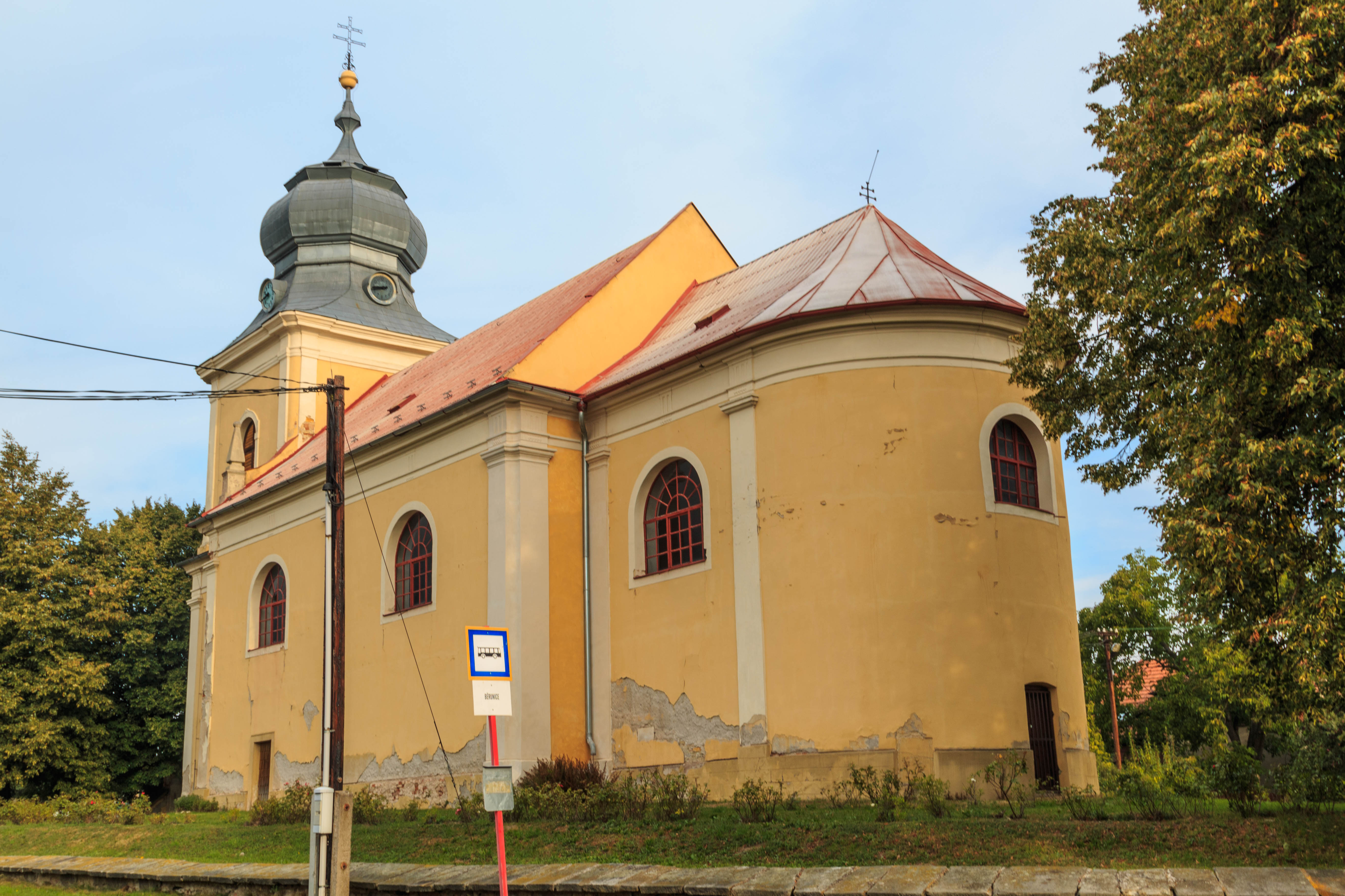 Běrunice kostel